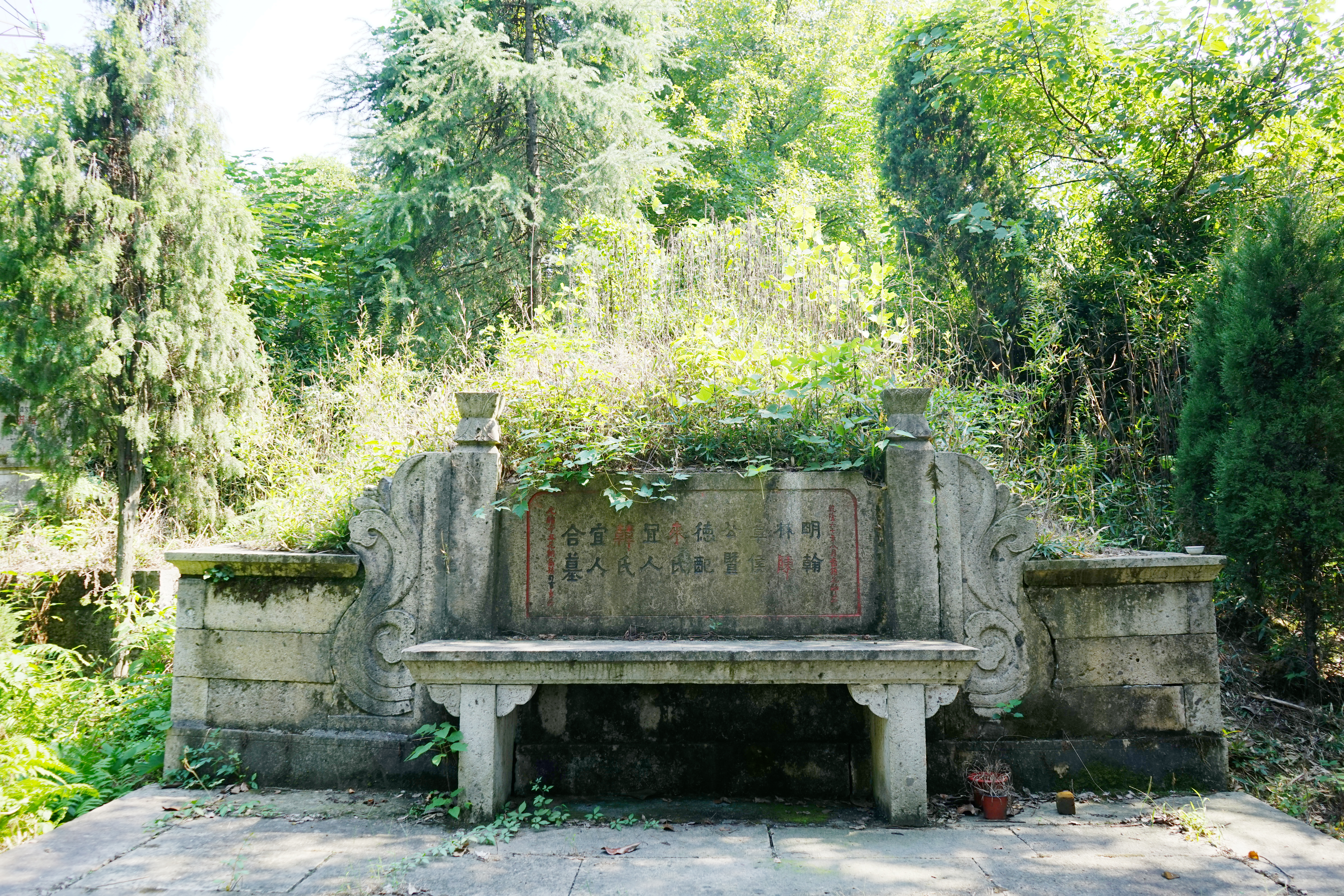 中文（中国大陆）: 陈洪绶墓正面